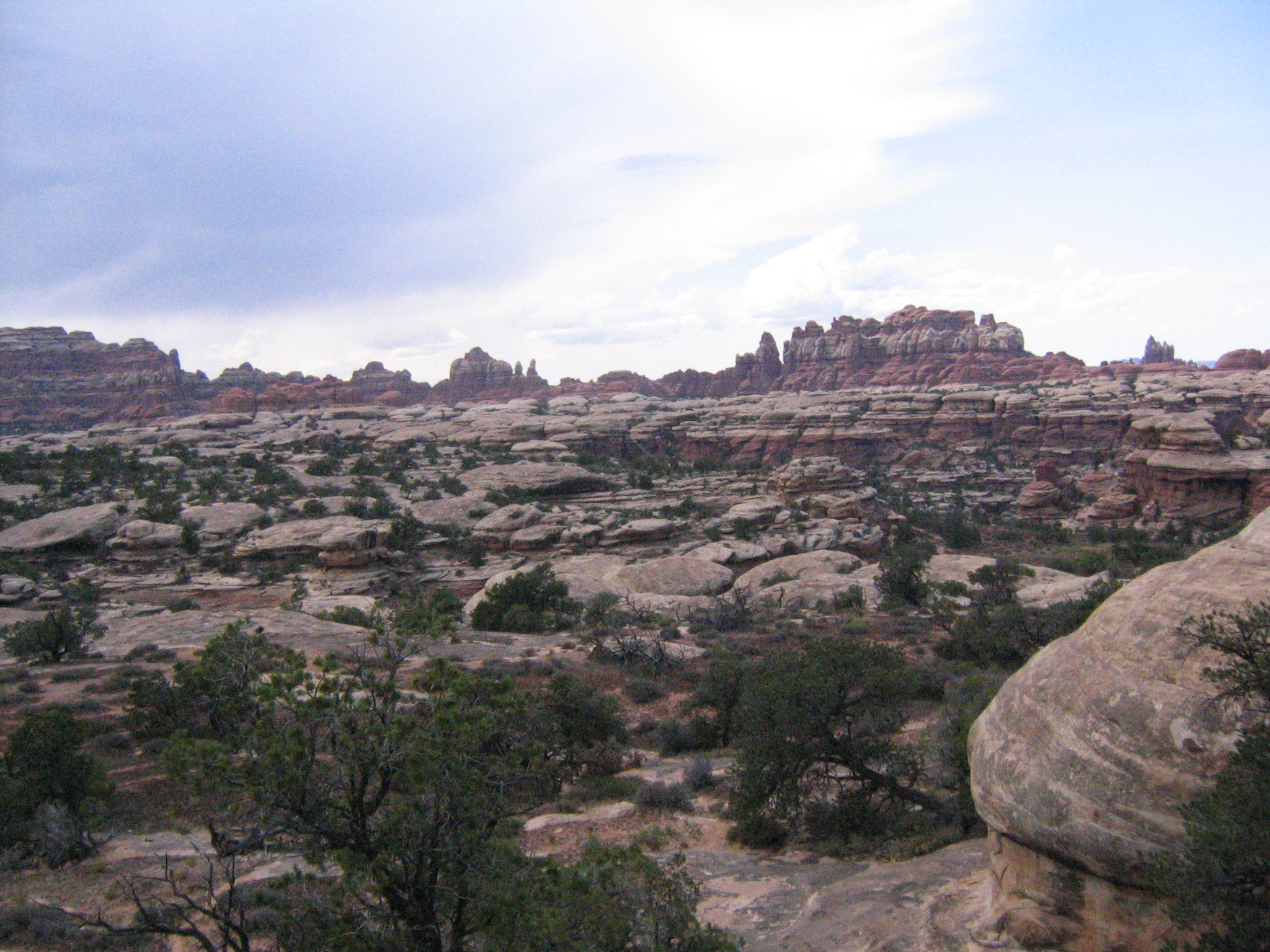 Parc nacional de Canyonlands, un paisatge travessat per les dues actrius.